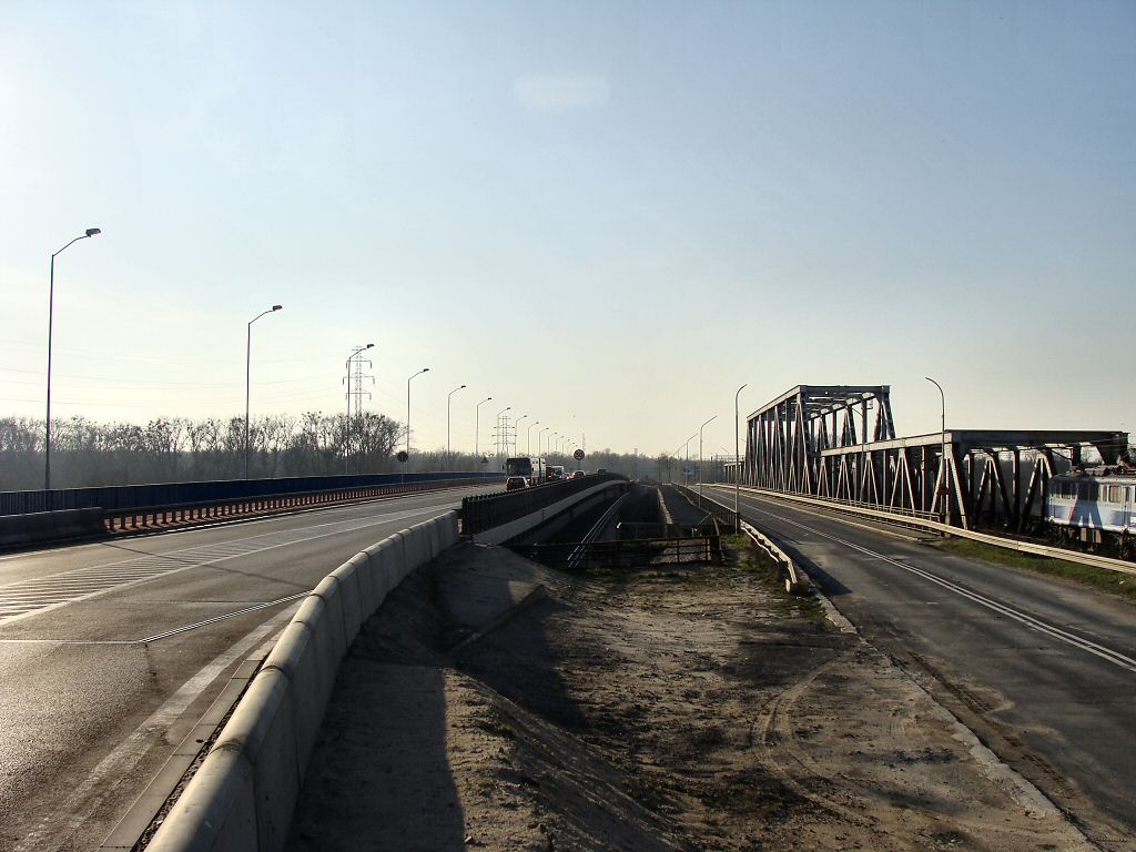 Mosty nad Regalicą w Szczecinie: po lewej: Most Gryfitów; w środku: wyłączony z eksploatacji i przeznaczony do rozbiórki Most I Armii Wojska Polskiego; po prawej: most kolejowy